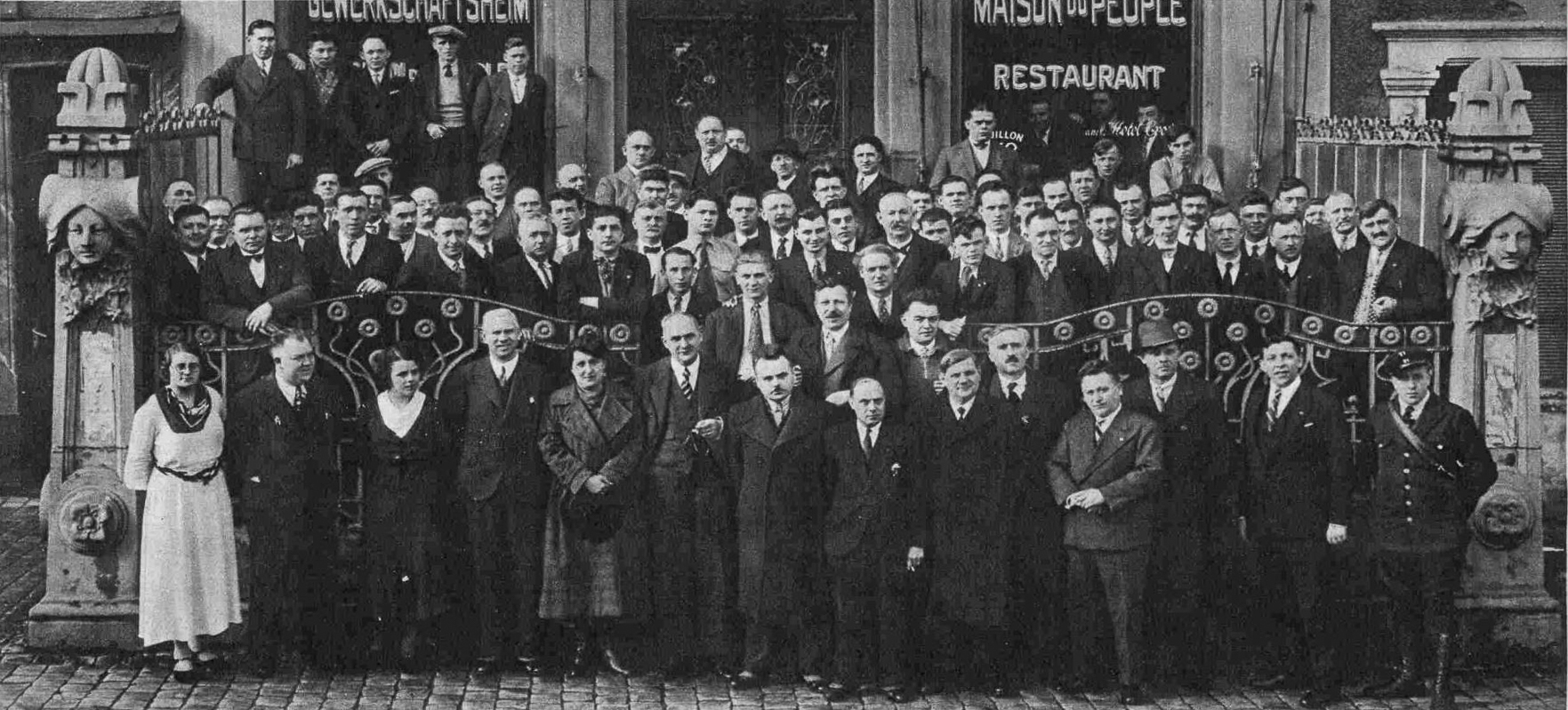 Den 10. Kongress vum Luxemburger Berg- und Metallindustriearbeiter-Verband war de 24. Februar 1935 an der Maison du Peuple zu Esch. Original caption: "BILDER DER WOCHE -- Am Sonntag den 24. Februar tagte in Esch der 10. Verbandstag des Luxemburger Berg-, Metall- und Industriearbeiter-Verbandes."